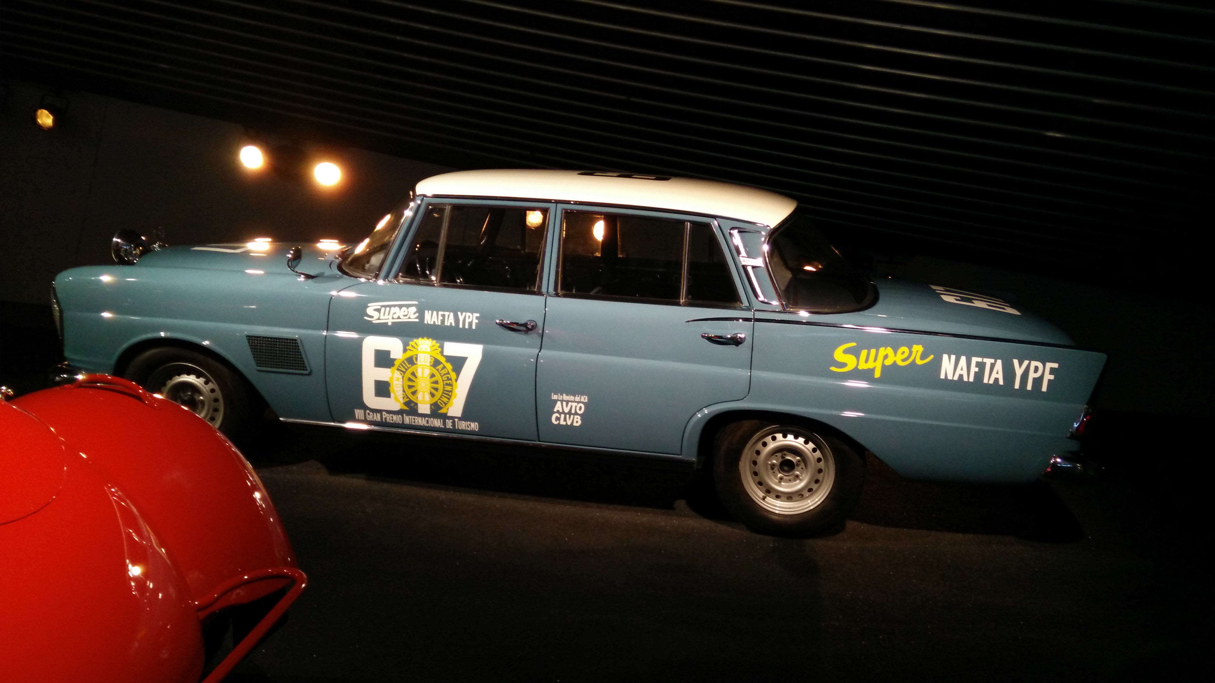 IMG_20141112_165853